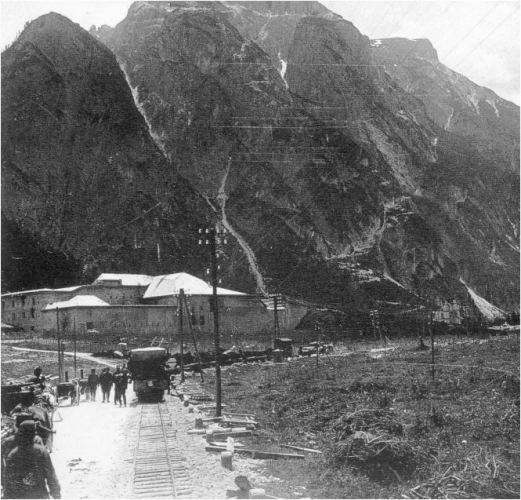 autore: ignoto provenienza: - grazie a Mauro Bottegal descrizione: Treno delle Dolomiti presso il forte di landro data: ignota, ma precedente il 1964 Licenza d'uso: Pubblico dominio